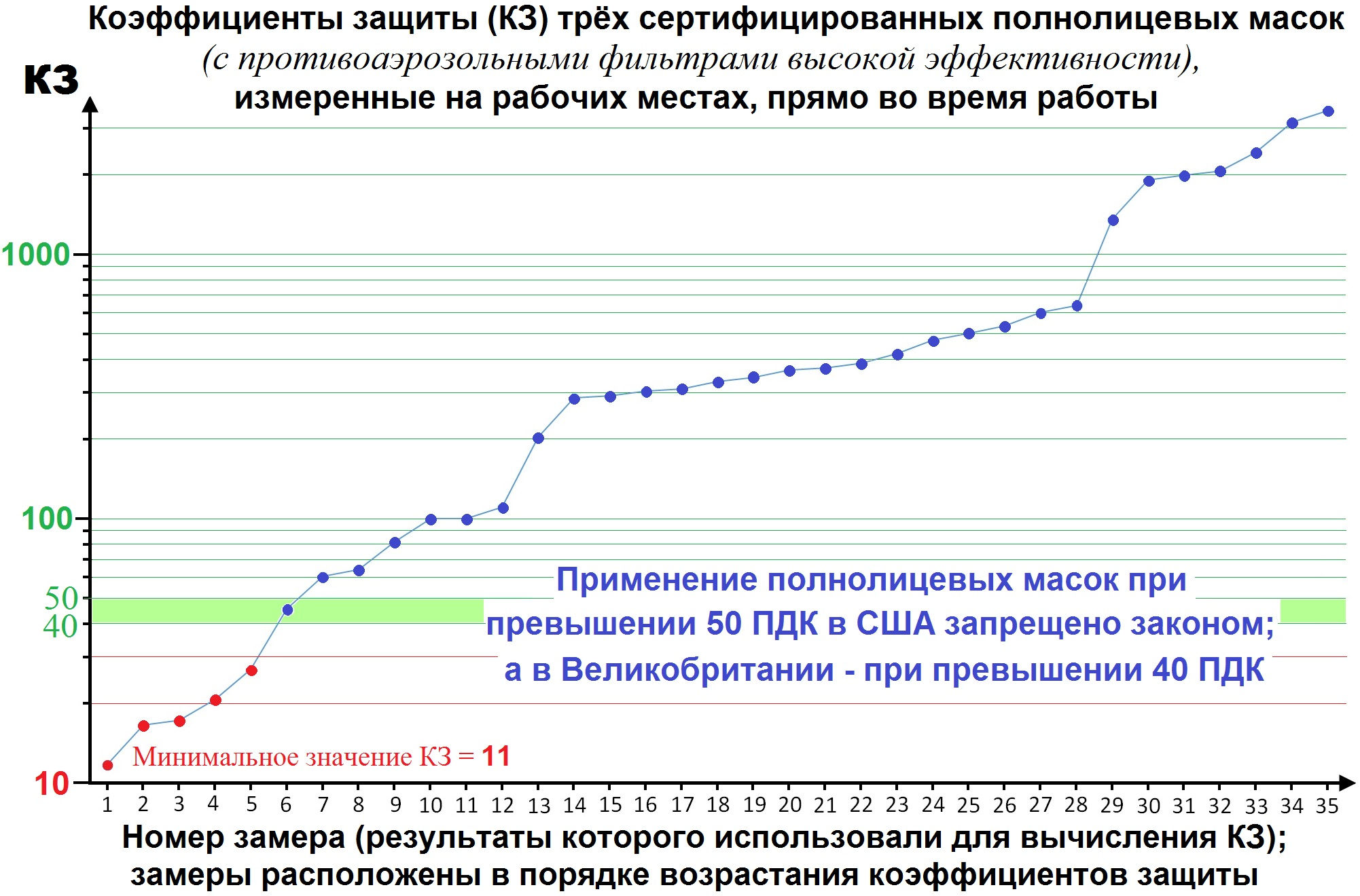 Показаны значения коэффициентов защиты респираторов (отношение средней концентрации вредного вещества снаружи маски к средней концентрации под маской при одновременном замере). Замеры проводились прямо на рабочих местах, во время выполнения работы, использовались три полнолицевых маски, сертифицированные HSE, с фильтрами высокой эффективности. Источник: Tannahill S.N., R.J. Willey and M.H. Jackson Workplace Protection Factors of HSE Approved Negative Pressure Full-Facepiece Dust Respirators During Asbestos Stripping: Preliminary Findings (англ.) // The British Occupational Hygiene Society The Annals of Occupational Hygiene. — Oxford, UK: Oxford University Press, 1990. — Vol. 34, no. 6. — P. 541-552. — ISSN 1475-3162. —